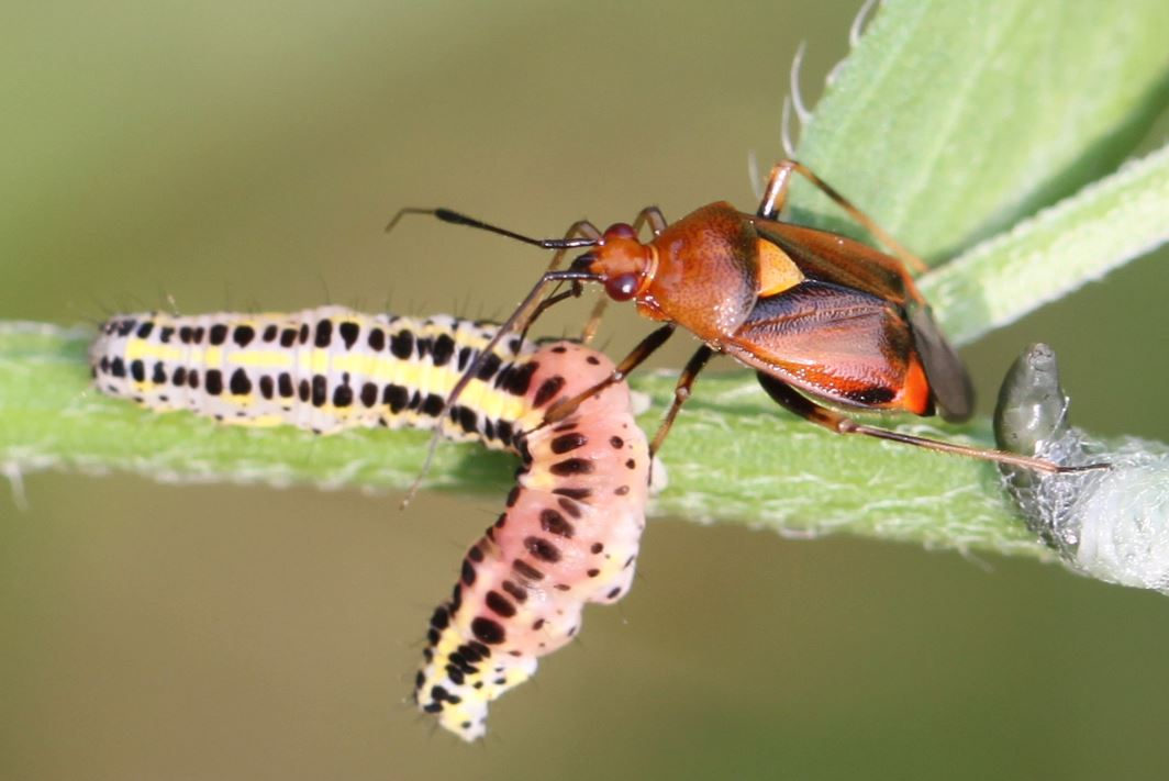 Rote Weichwanze (Deraeocoris ruber) saugt an Raupe einer Möndcheneule (Calophasia lunula), am 21.6.2017 in der Schwetzinger Hardt